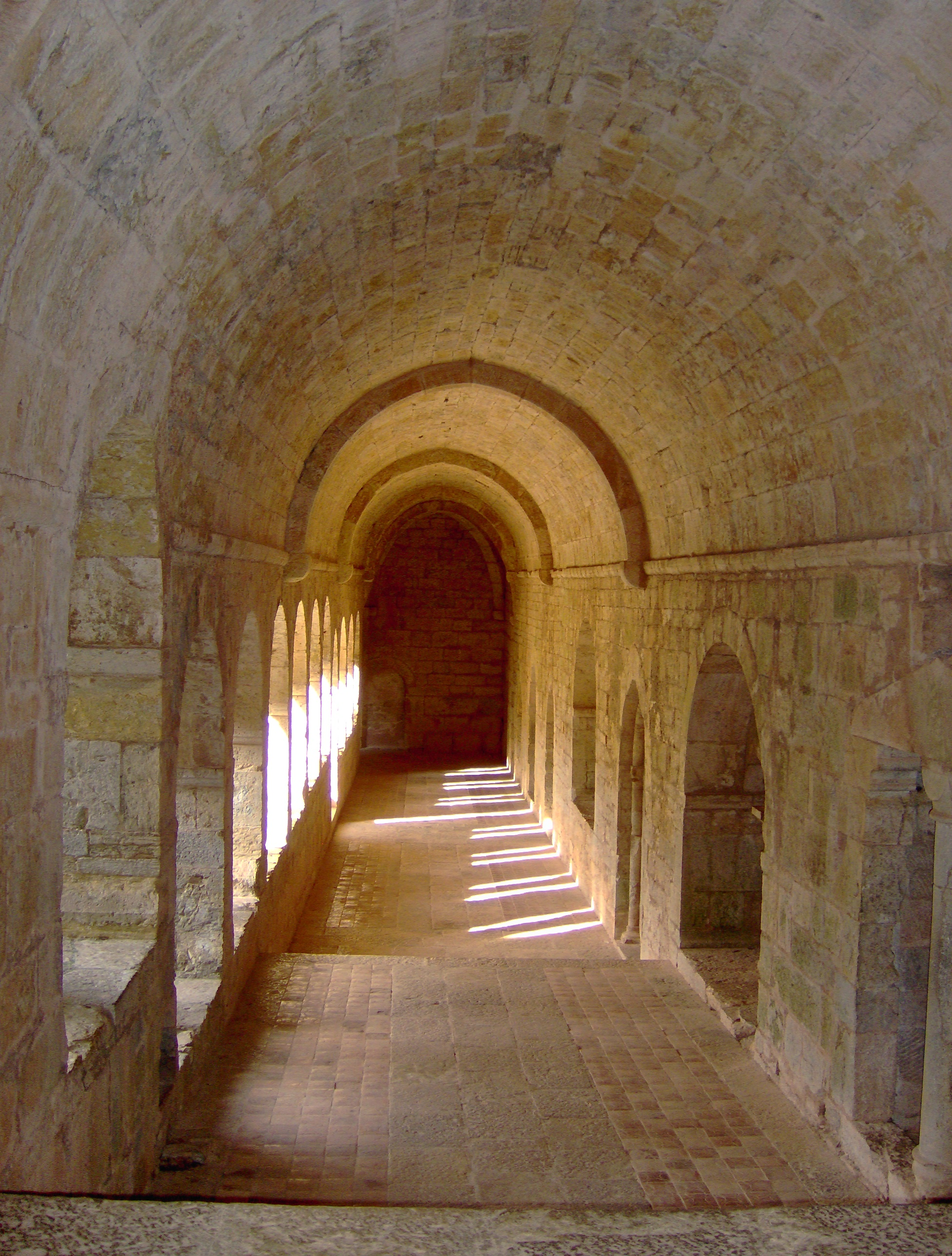 Galerie est du cloître de l'abbaye du Thoronet.